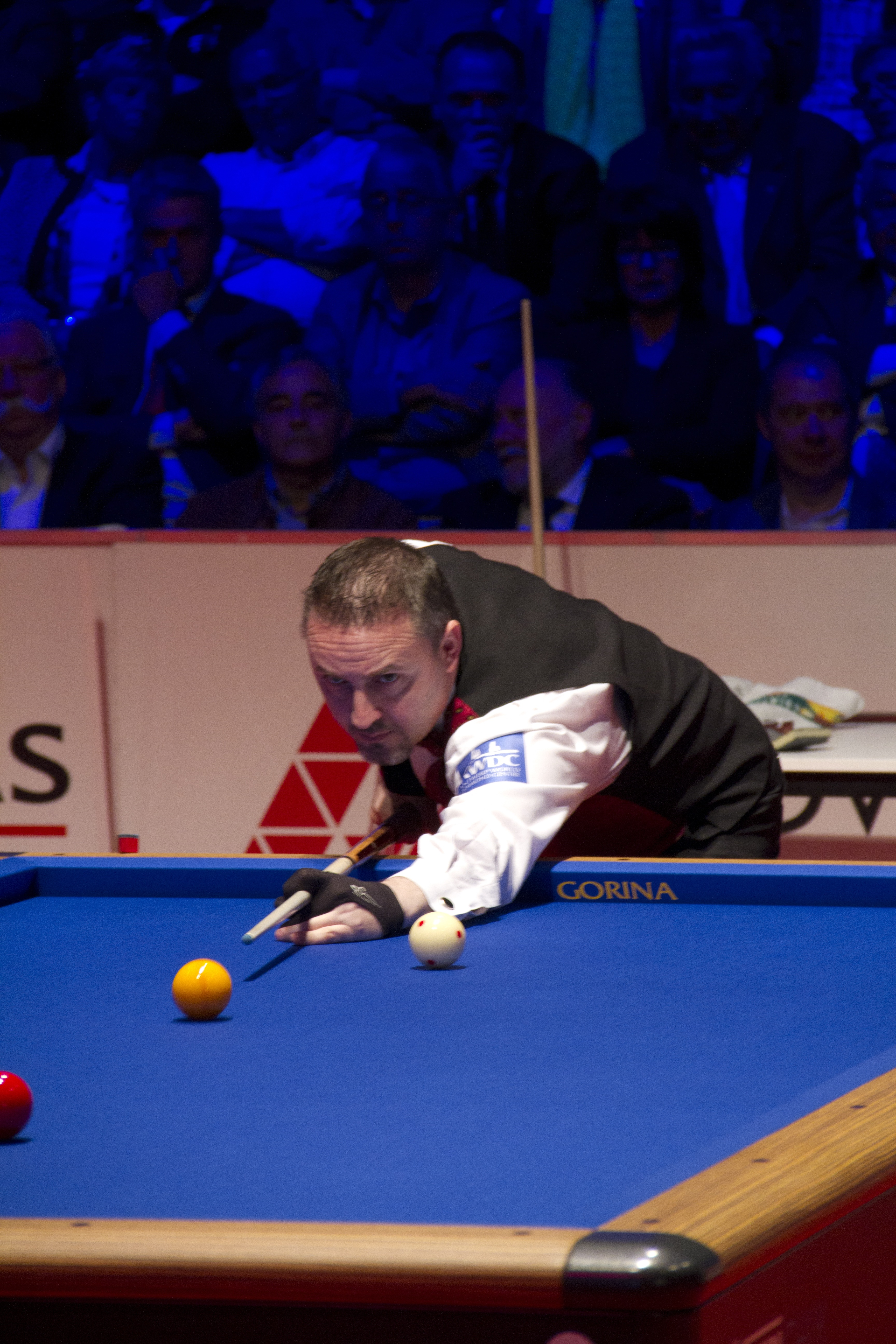 de:Das Finale zwischen dem Belgier Frédéric Caudron und Filipos Kasidokostas aus Griechenland. :en:The finals between Frédéric Caudron und Filipos Kasidokostas from Greece.